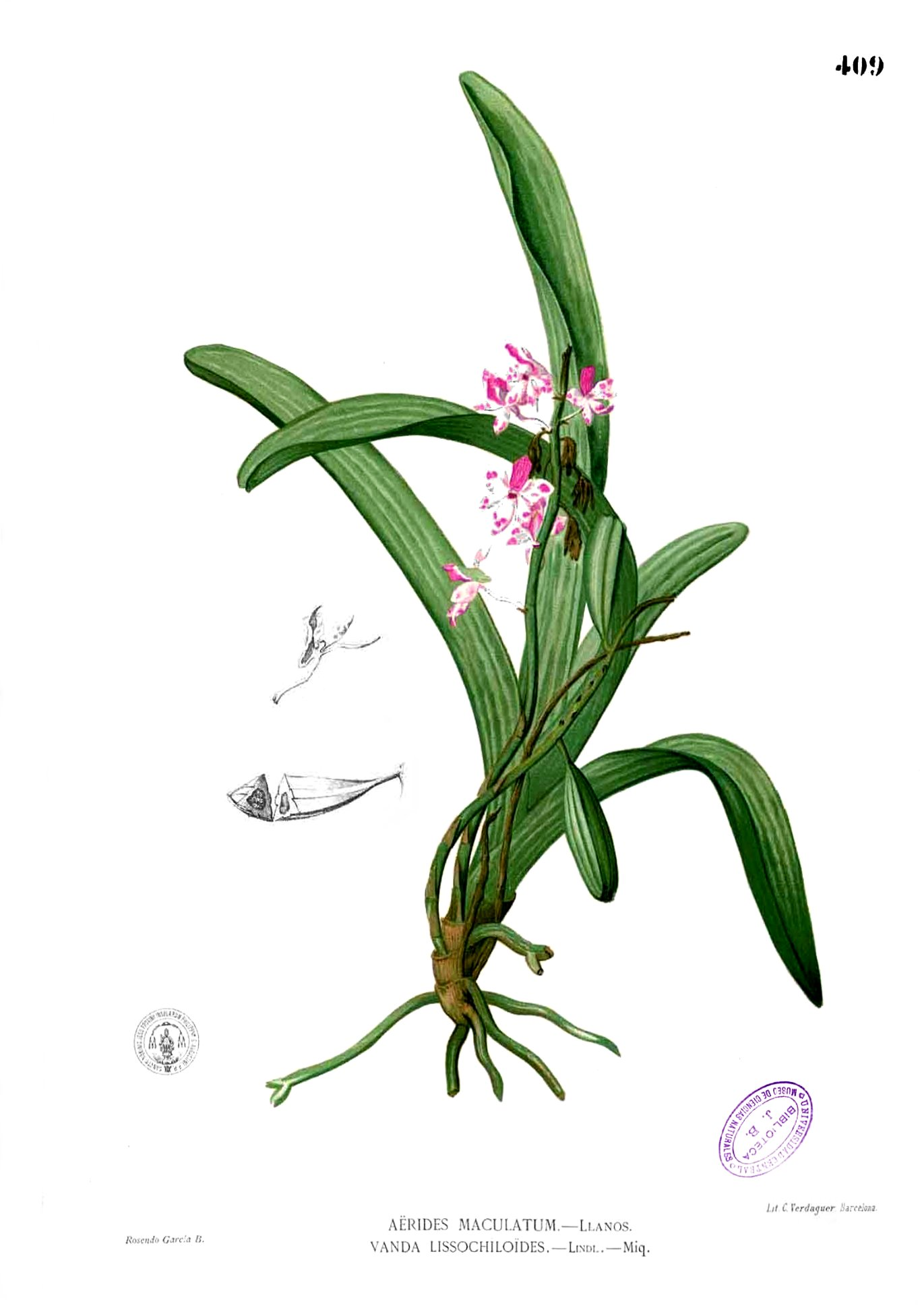 Aerides quinquevulnera - Plate from book